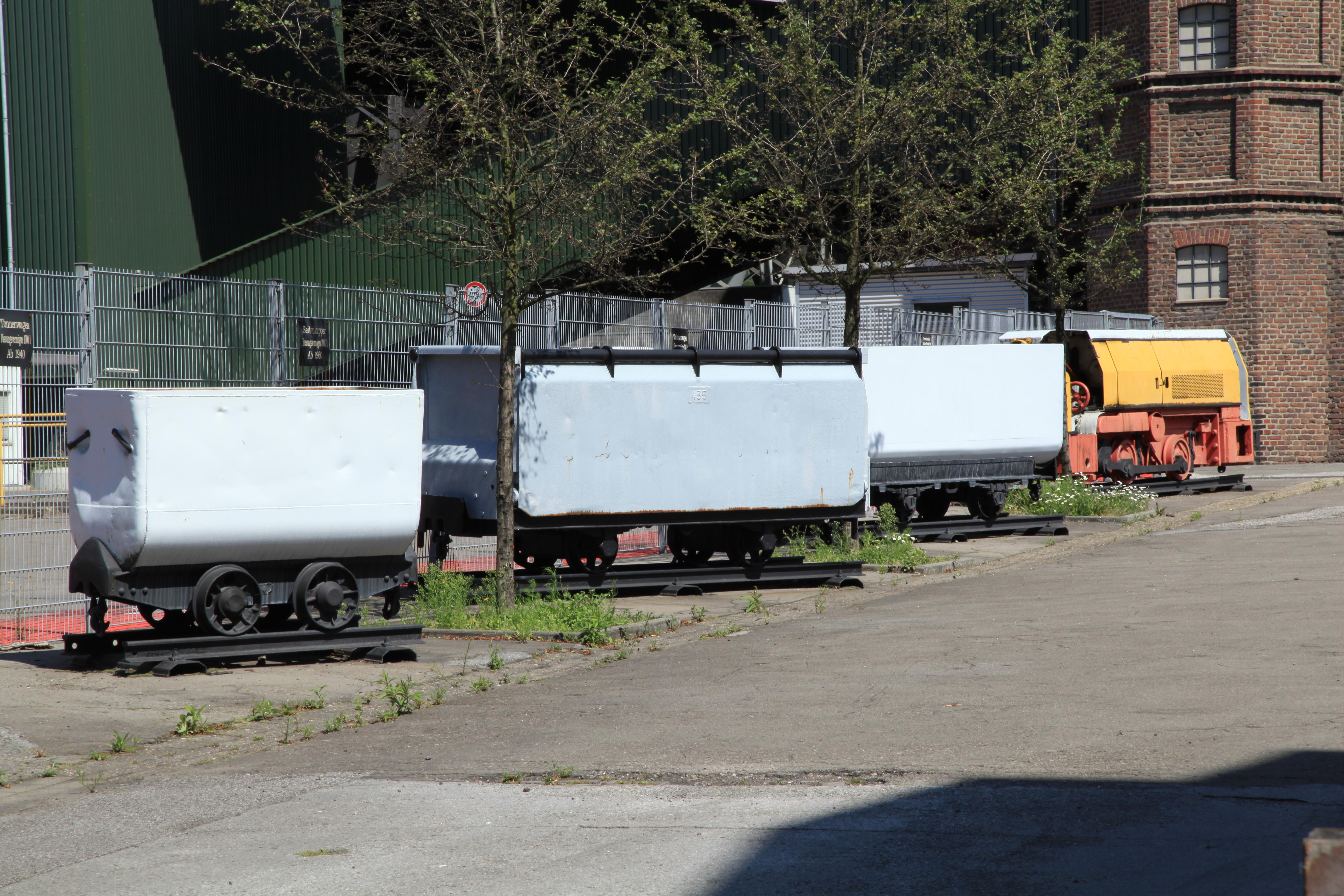 Schacht 2 der Zeche Prosper II, Knappenstraße in Bottrop